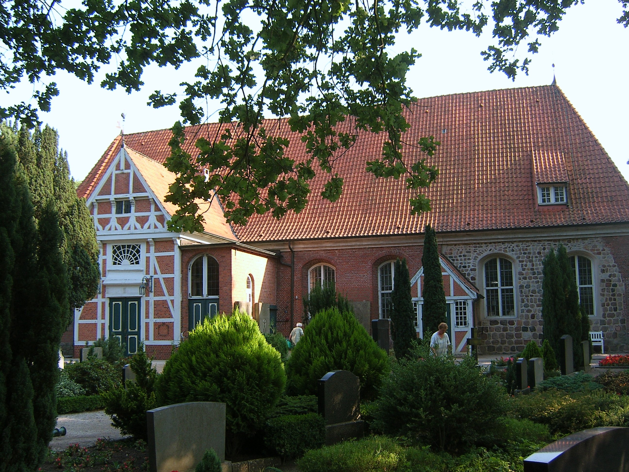 Hamburg, Kirchwerder, St.Severini, NordseiteThis is a photograph of an architectural monument.